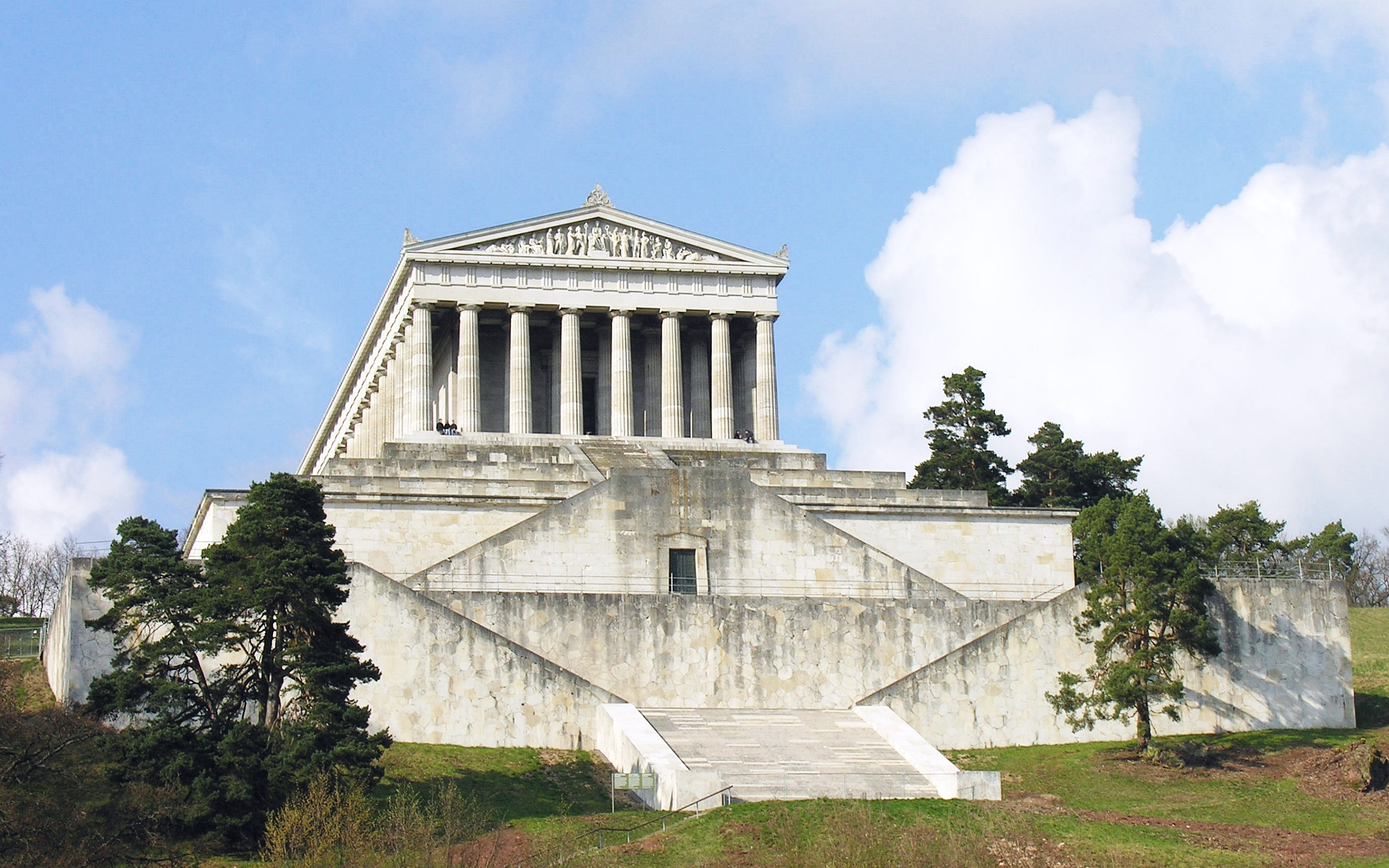 Walhalla (wie Parthenon) im Auftrag von König Ludwig I. bis 1842 erbaut. Ehrenhalle zur Würdigung deutschsprachiger Frauen und Männer, bei denen man verdienstvolles Wirken zum Anlass der Ehrung macht - ausgestellt sind Büsten und Gedenktafeln. Nahe Donaustauf, Bayern - Foto Wolfgang Pehlemann DSCN2430